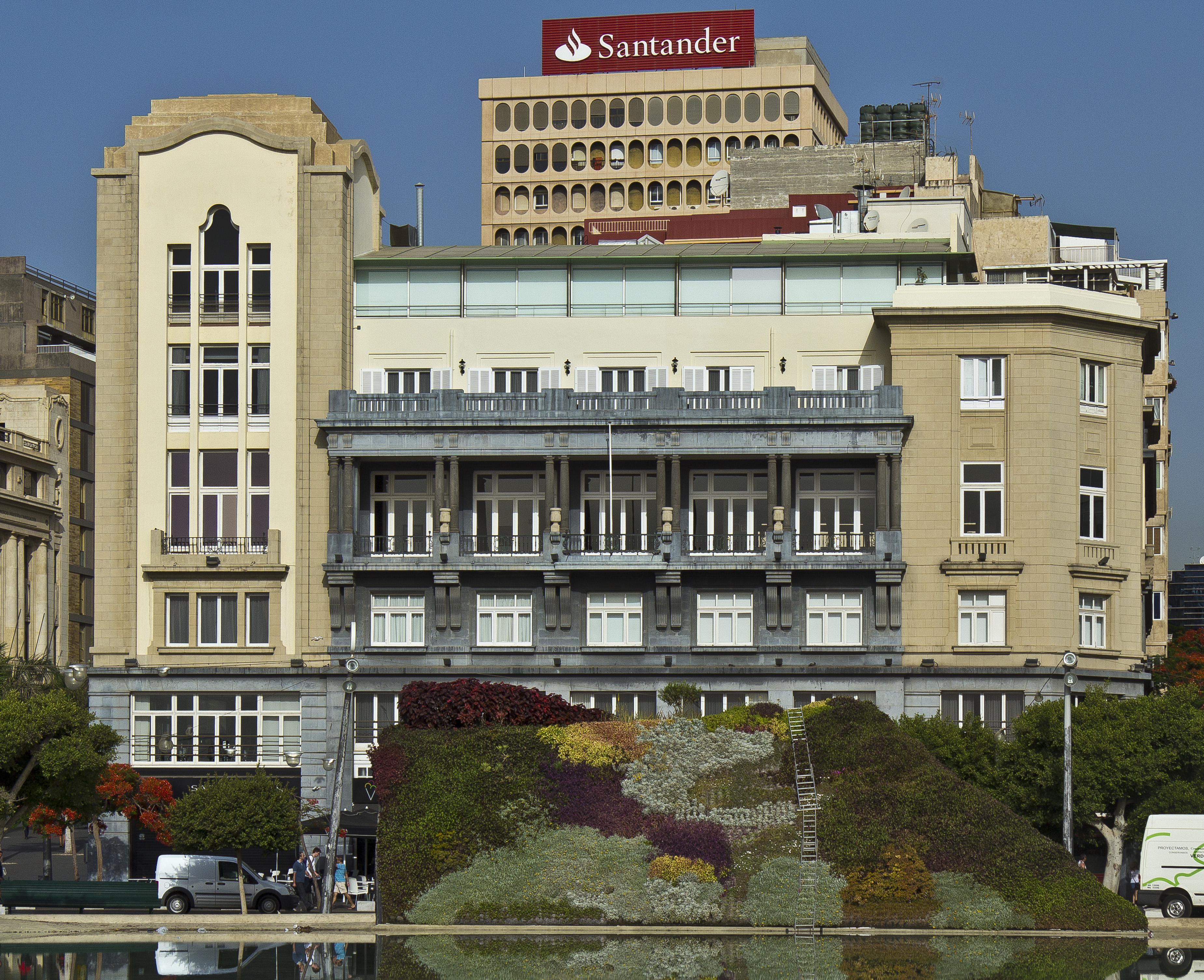 Das Casino de Tenerife befindet sich an der Ecke der Plaza de España und der Plaza Candelaria in Santa Cruz de Tenerife. Es wurde im Jahr 1935 fertiggestellt. Der Architekt war Miguel Martín Fernandez de la Torre. Das Gebäude steht seit dem Jahr 2006 unter Denkmalschutz.